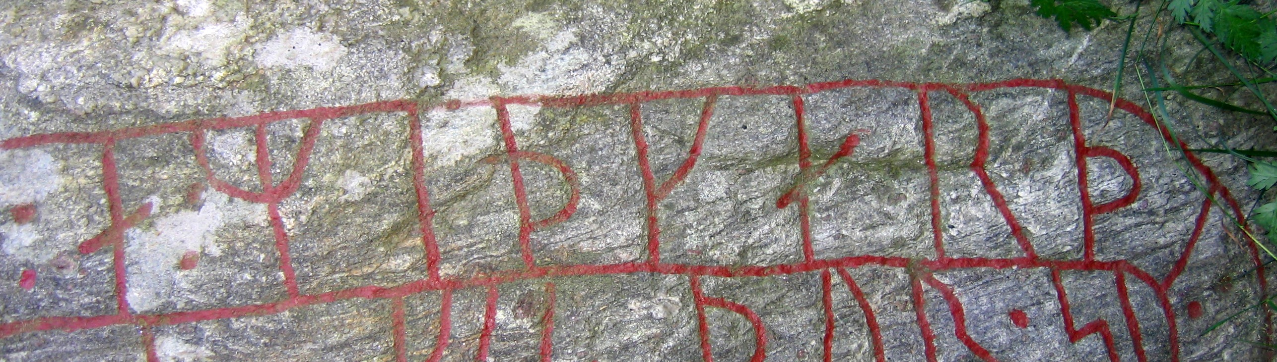 Runstenen Sö 56 i Fyrby, Blacksta, Flen. Detalj som visar ordet "Midgård".